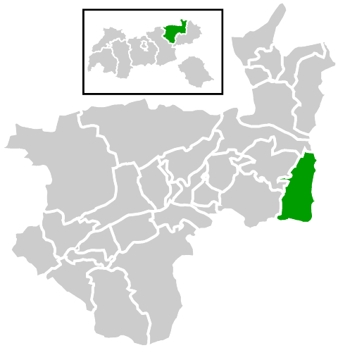 Lage der Gemeinde innerhalb des Bezirks Kufstein